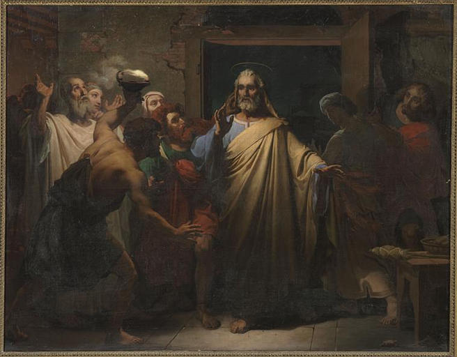 SAINT PIERRE DELIVRE DE PRISON